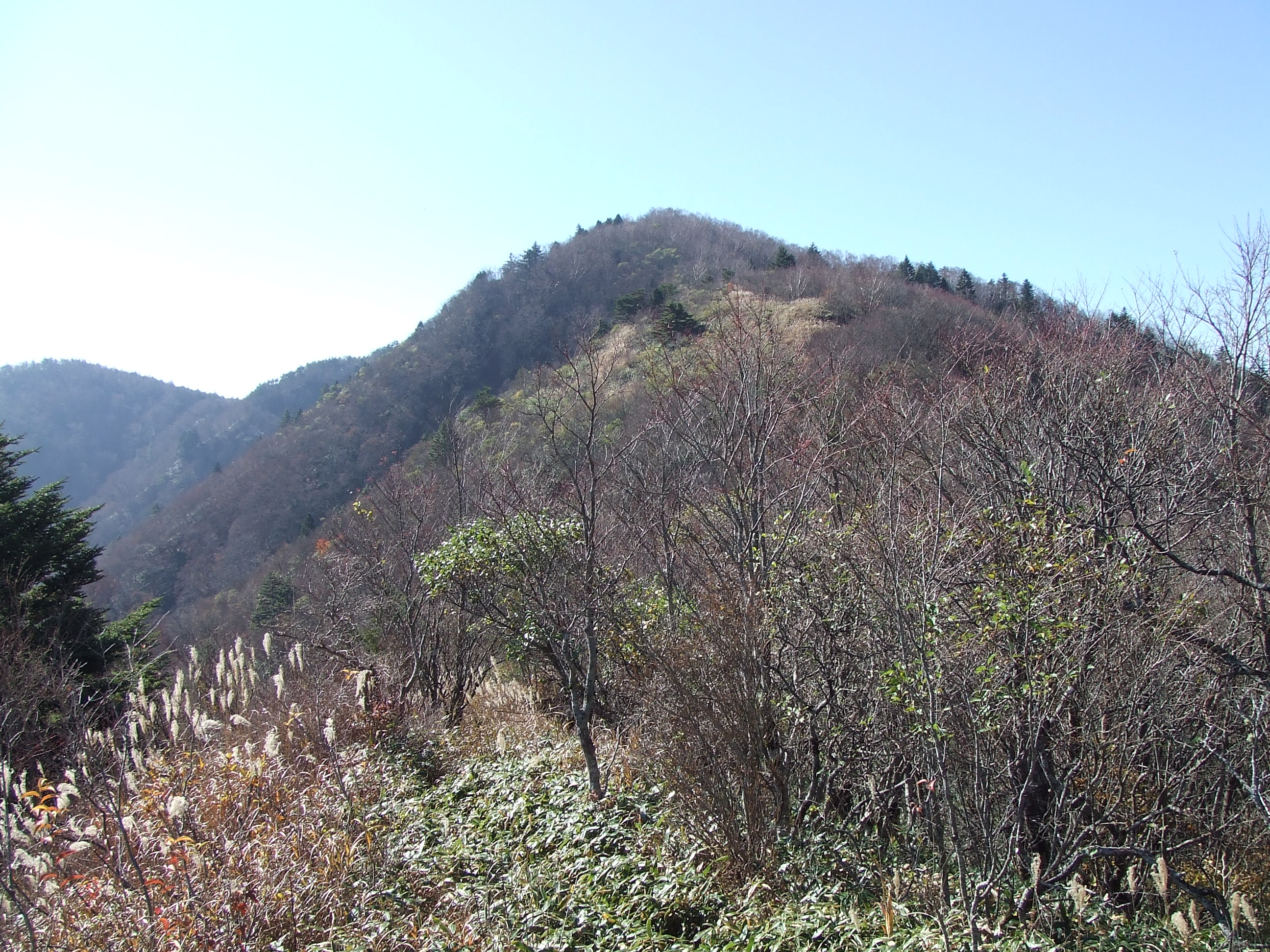 山頂へ向かう登山道より